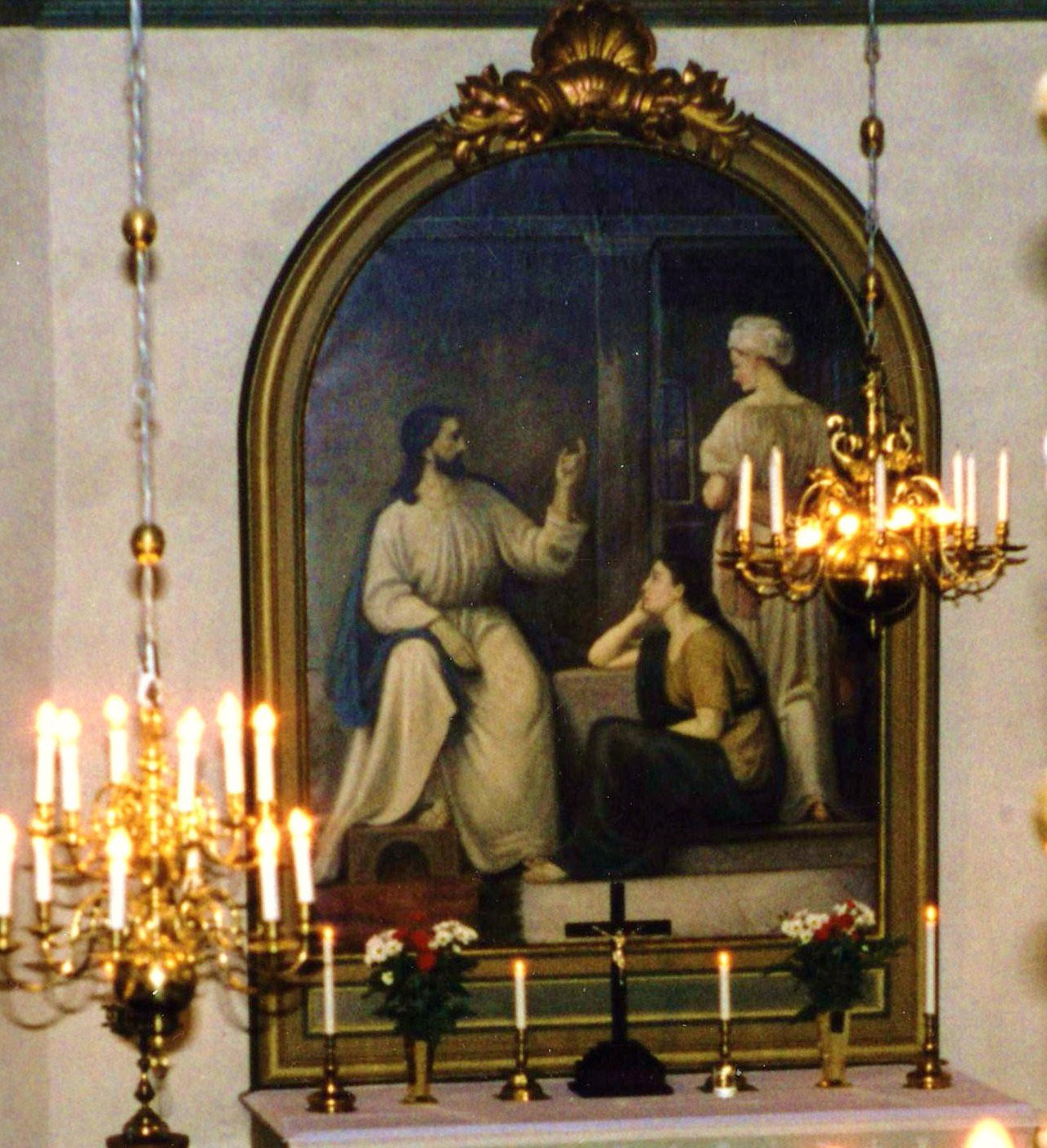 Lugnås kyrka.Jesus hos Marta och Maria i Betania.Målning 1906 av Sven Linderoth.